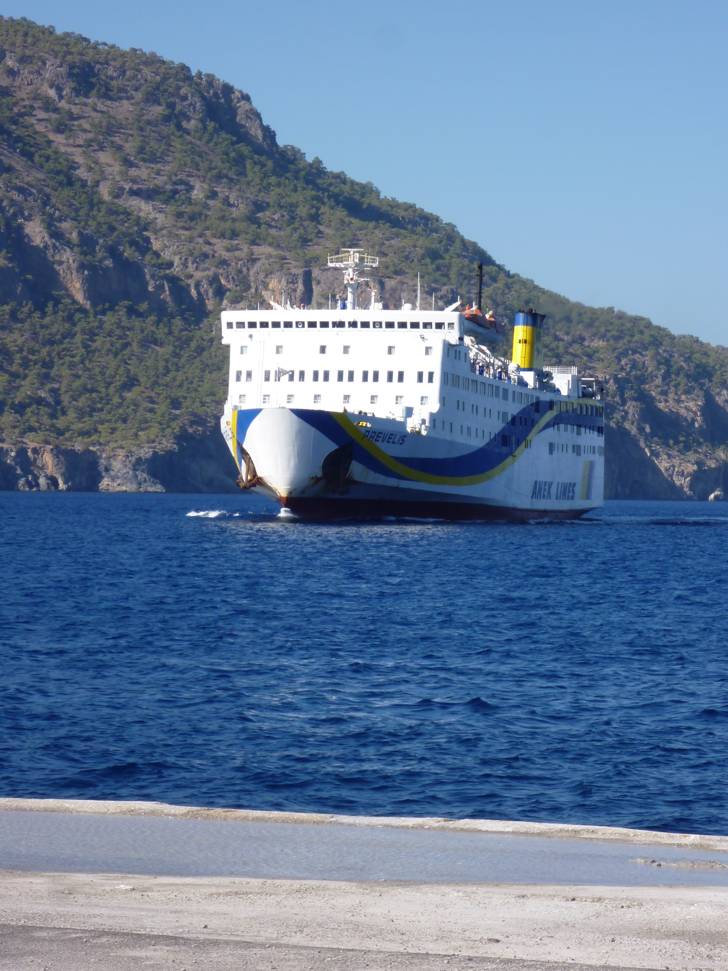 Eine Fähre der Anek Lines (Preveli) kurz vor dem Anlegen am Hafen von Karpathos-Stadt.